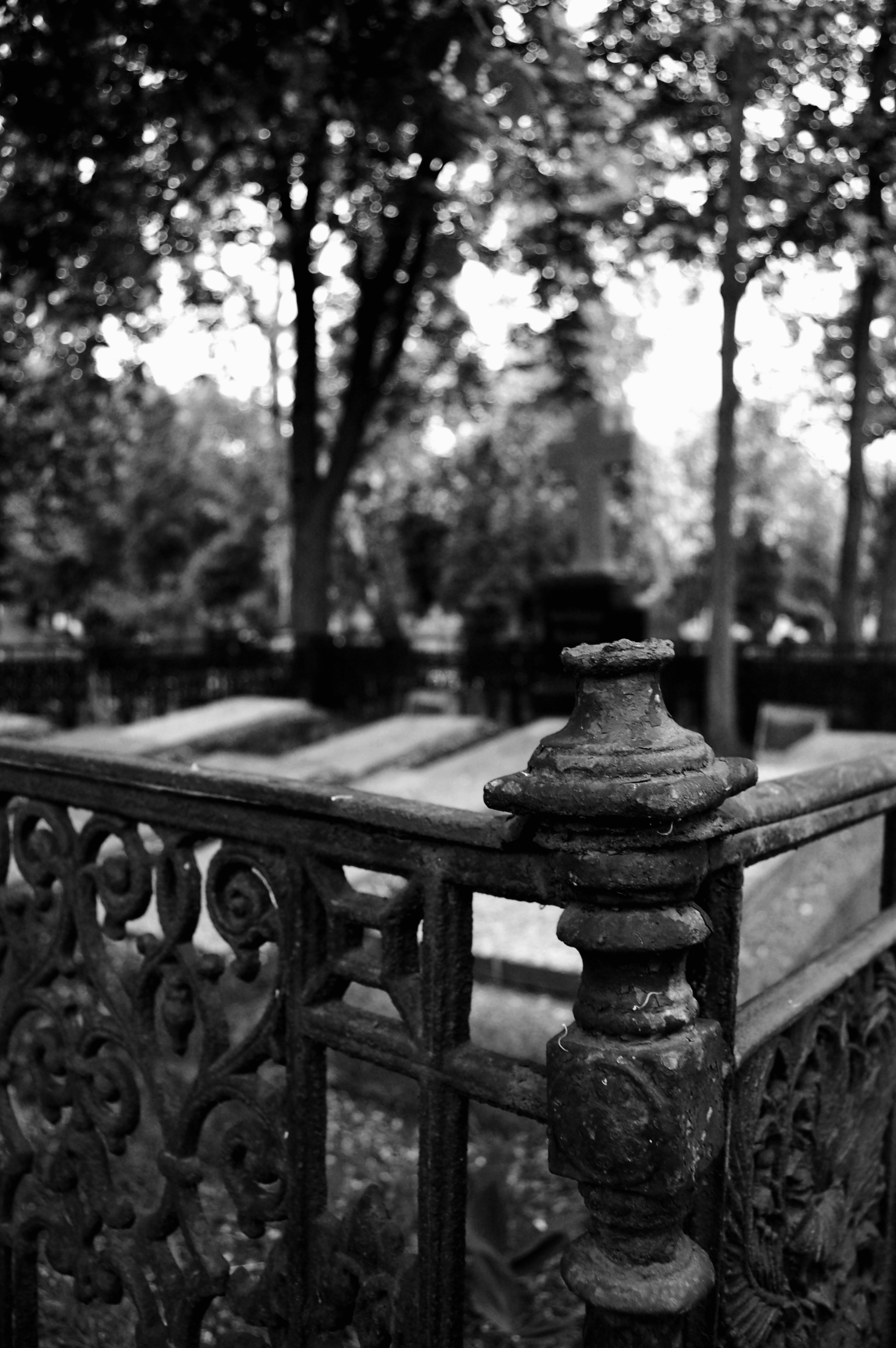 Cmentarz Komunalny we Włocławku